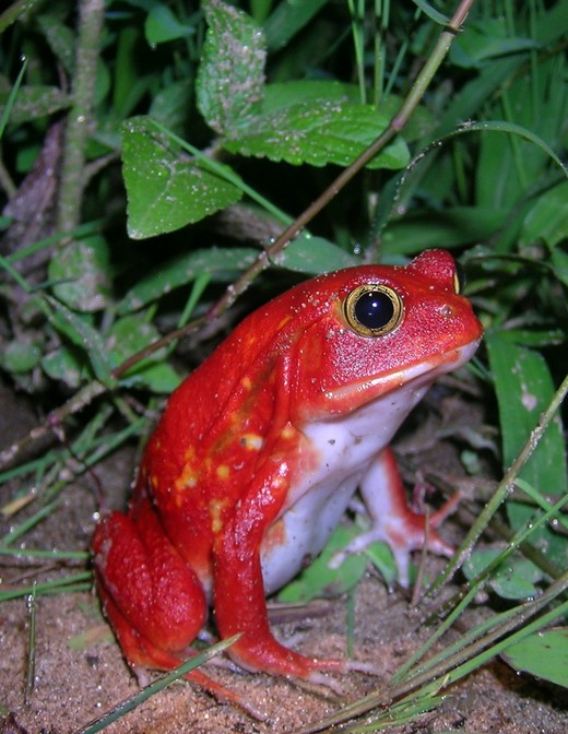 Dyscophus antongilii